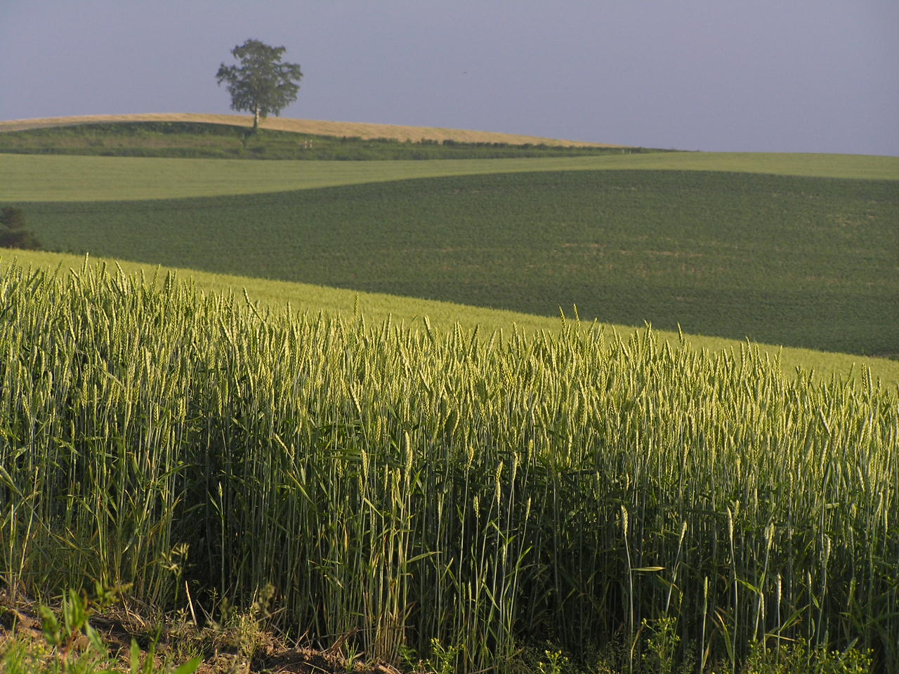 美瑛の夏唐山健志郎撮影